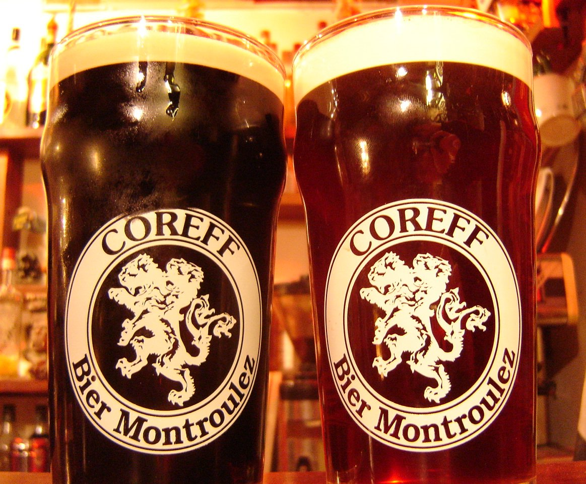 Photo par Emmanuel Prochasson, prise au Torr E Benn (Nantes, France) le 27 Janvier 2007. Le verre de gauche est une pinte (50cl) de Coreff Noire (Stout), celui de droite une pinte de Coreff Ambrée.